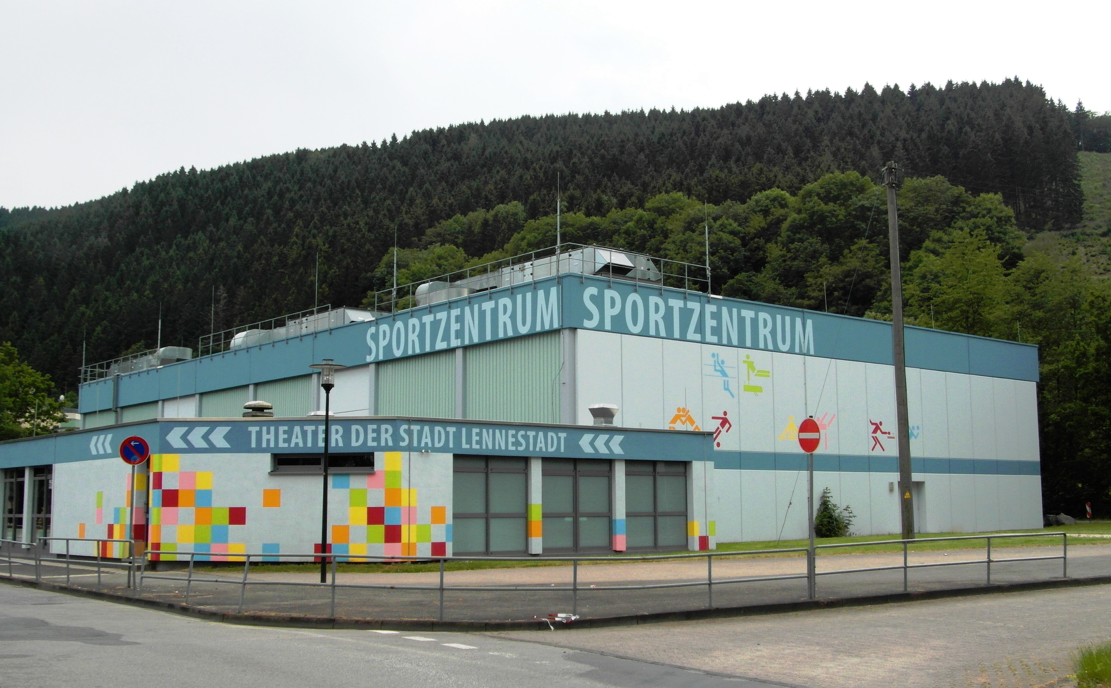 Theaterbereich der Anne-Frank-Schule in Meggen; hier finden die Aufführungen der Kulturgemeinde Lennestadt statt